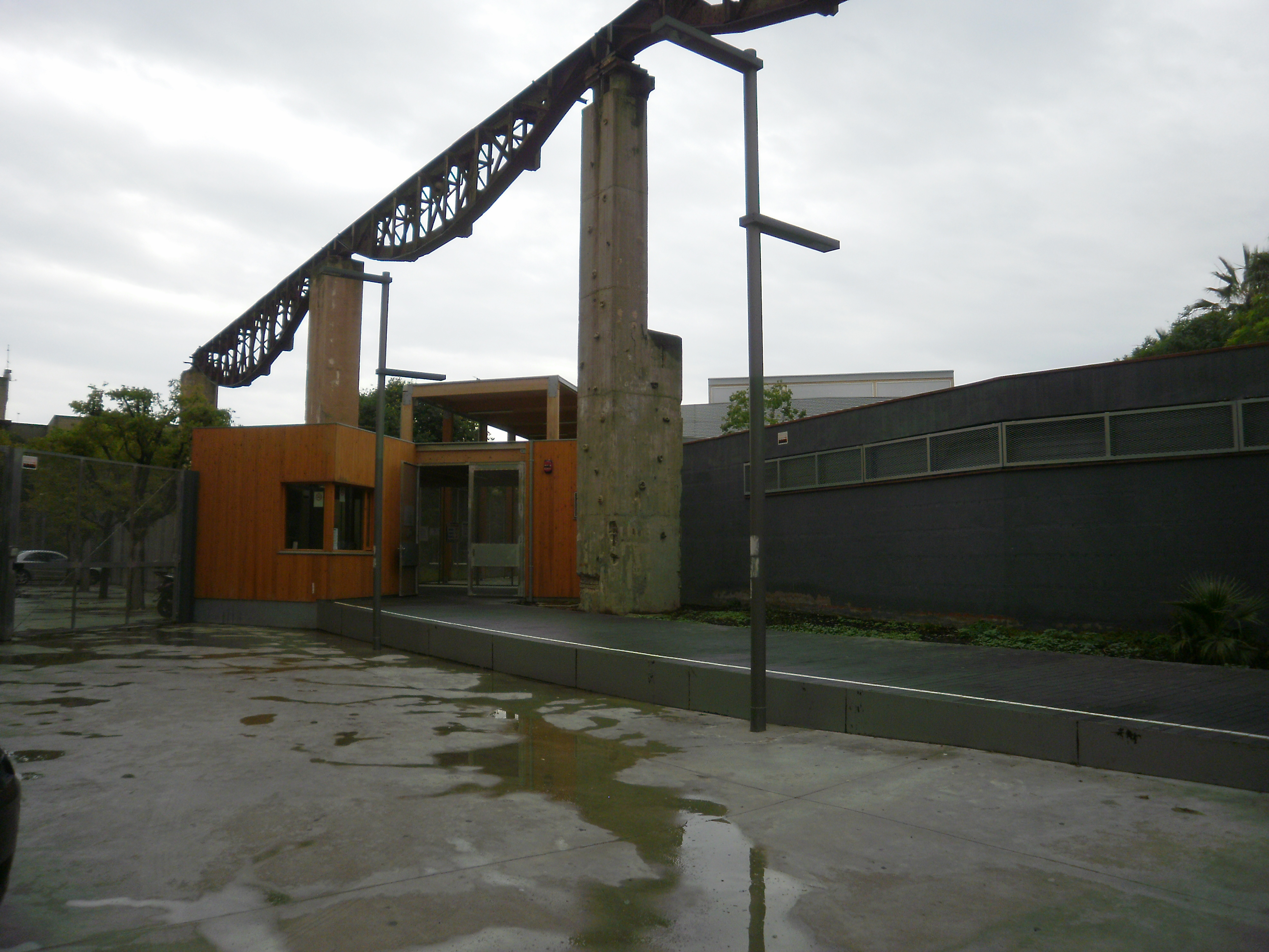 INS Joan Salvat-Papasseit